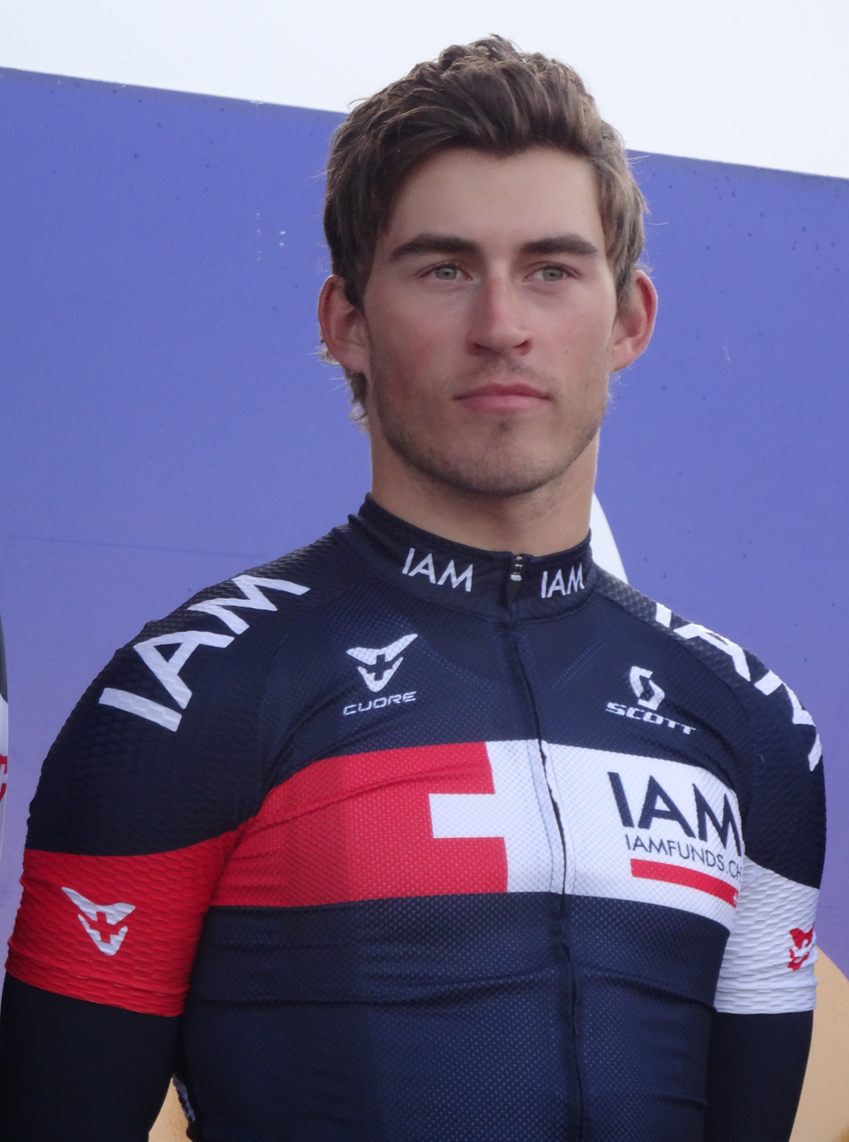 Reportage réalisé le dimanche 21 septembre à l'occasion du départ et de l'arrivée du Grand Prix d'Isbergues 2014 à Isbergues, Nord-Pas-de-Calais, France.